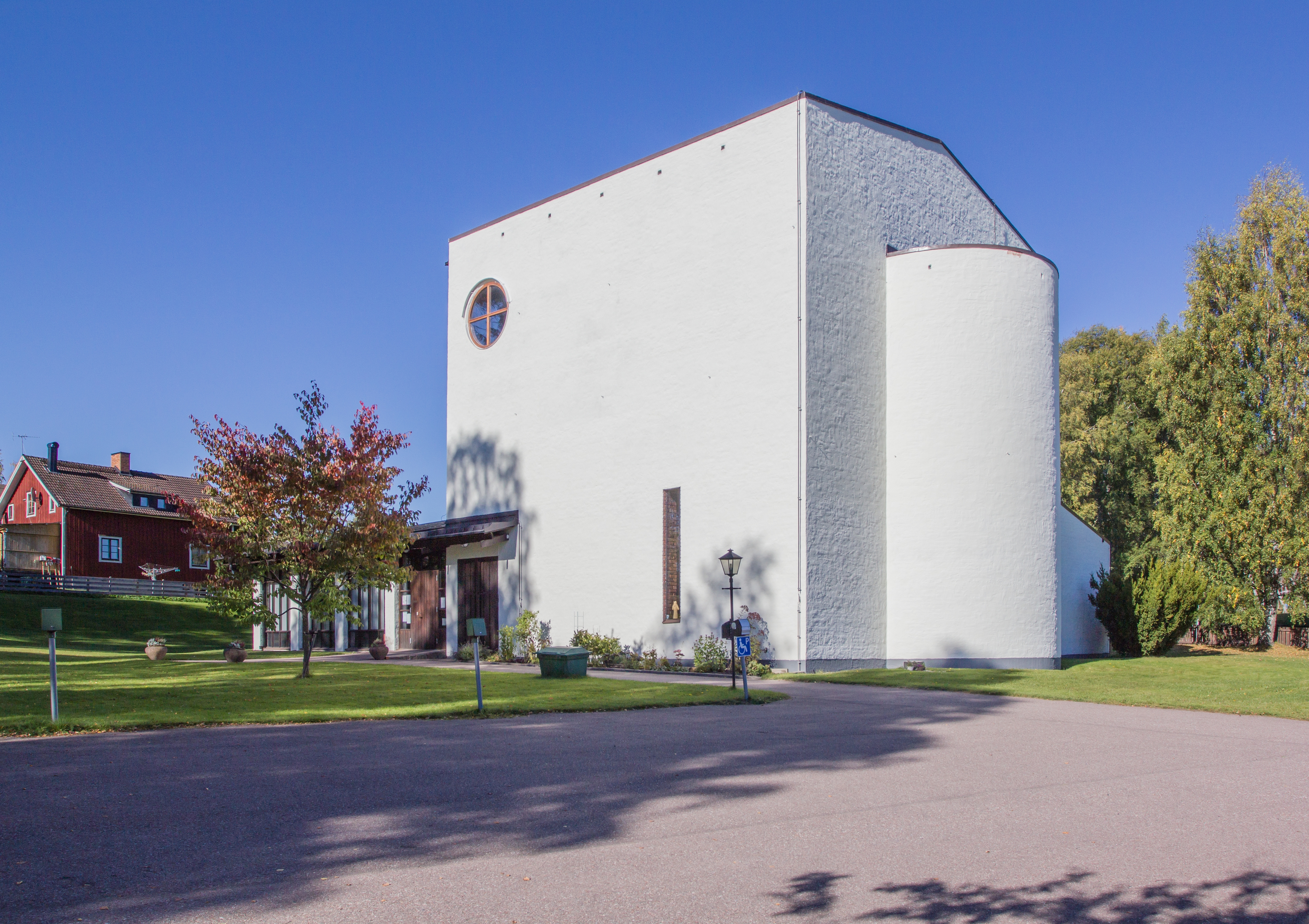 Vikmanshyttans kyrka, Dalarna, Sverige